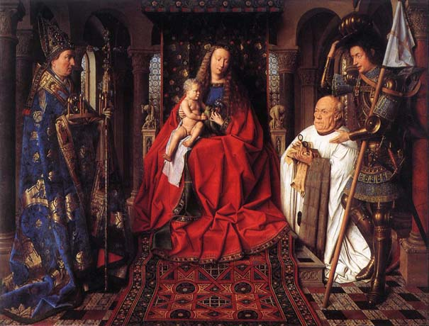 la Madone au Chanoine van der Paele aurait été achevée en 1436 selon une inscription sur le cadre. Il s'agit du plus grand tableau conservé du peintre.